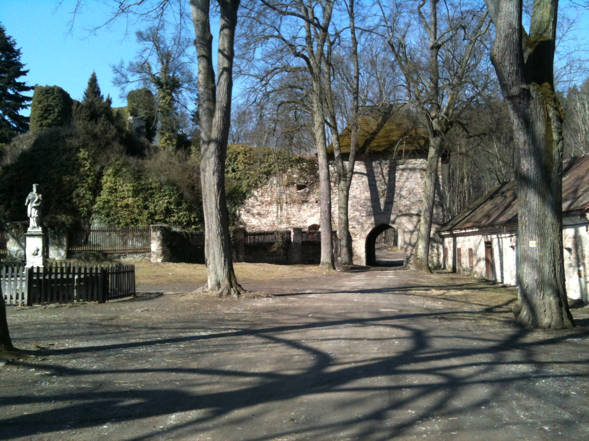 592 62 Nedvědice, Czech Republic